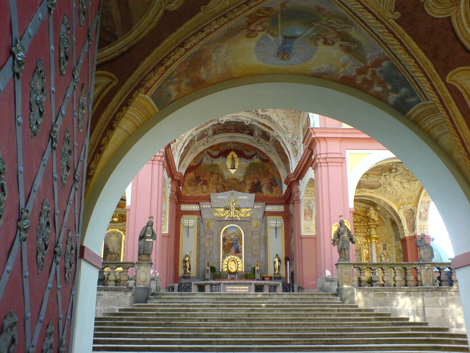 Svata Hora. Svatá Hora, vstup. Vstup do kostela.